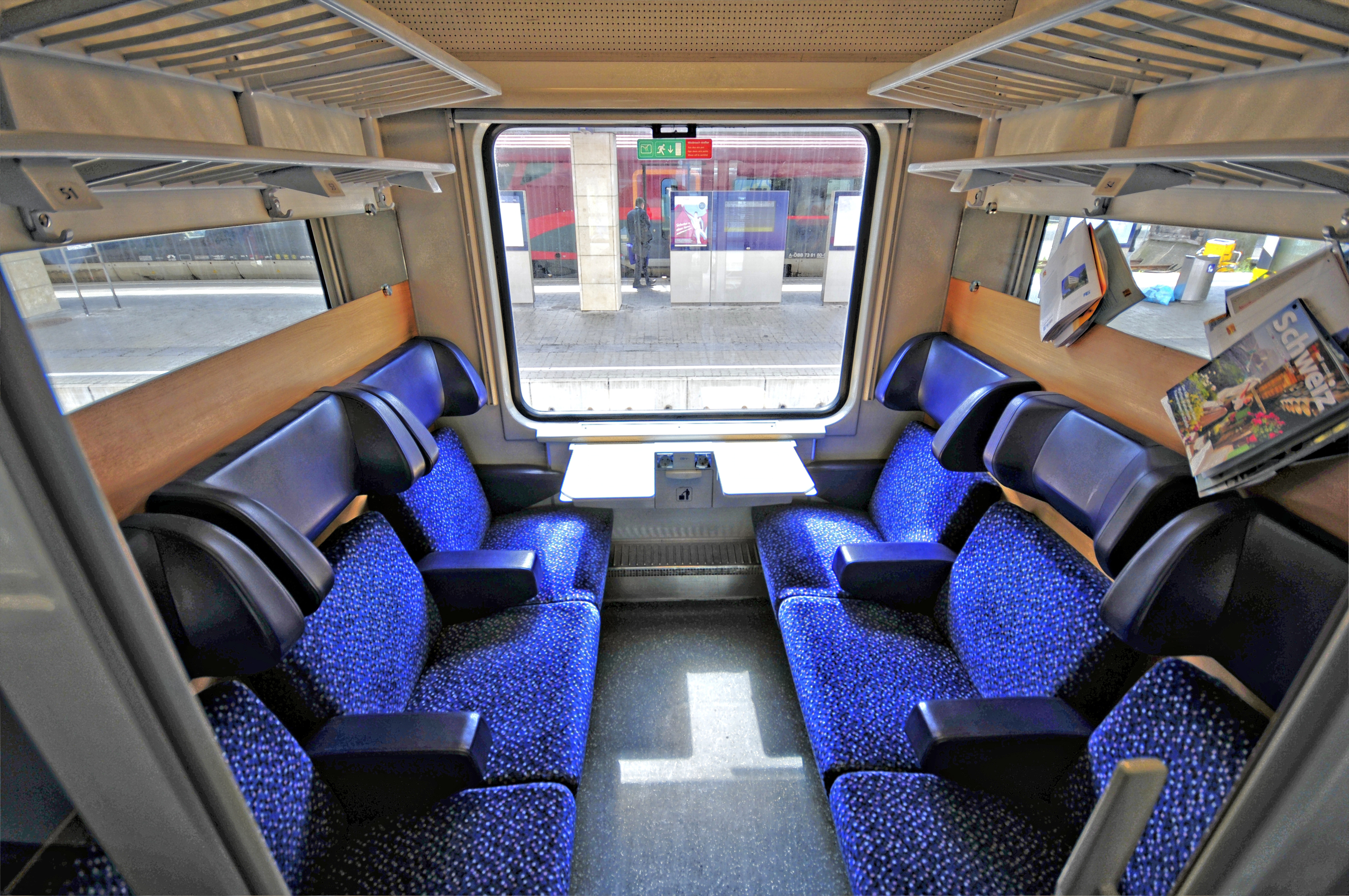 Bmz-Wagen der ÖBB